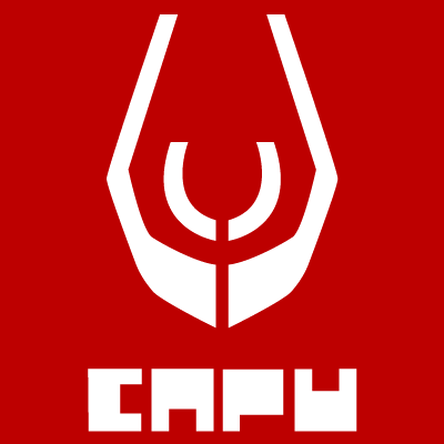 Logo oficial